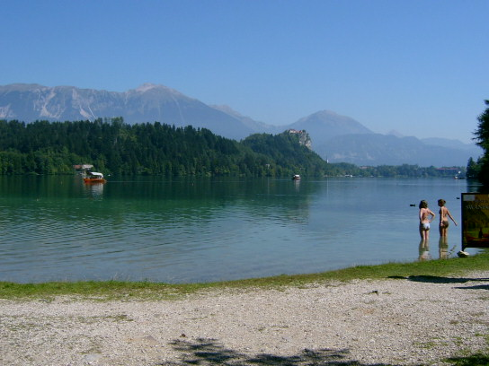 Lago de Bled (Slovenio) Lago de Bled (memfarita foto libere uzebla)